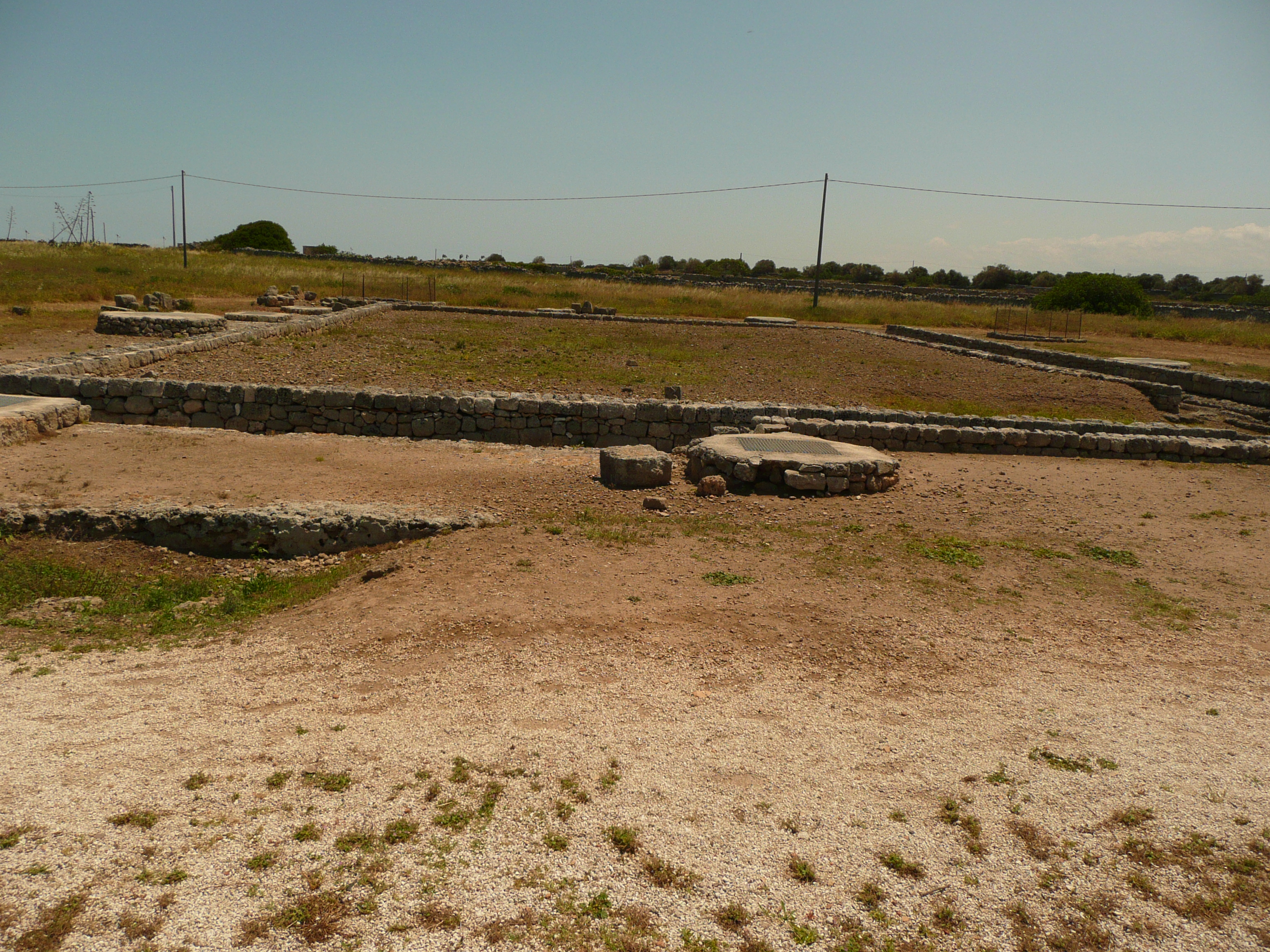 Parque arqueológico de Egnazia, Apulia.